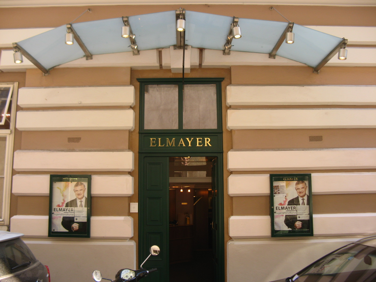 Tanzschule Elmayer, Bräunerstraße, Wien-Innere Stadt